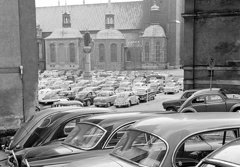 Parkerade bilar vid Birger jarls Torg. I bakgrunden Riddarholmskyrkan på Riddarholmen i Stockholm.(Bilden är beskuren)